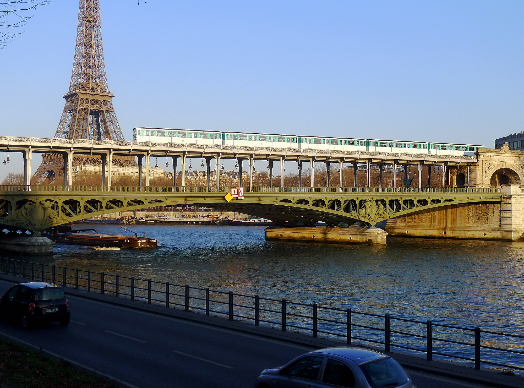 Pont de Bir Hakeim - Paris VII, XV et XVI .